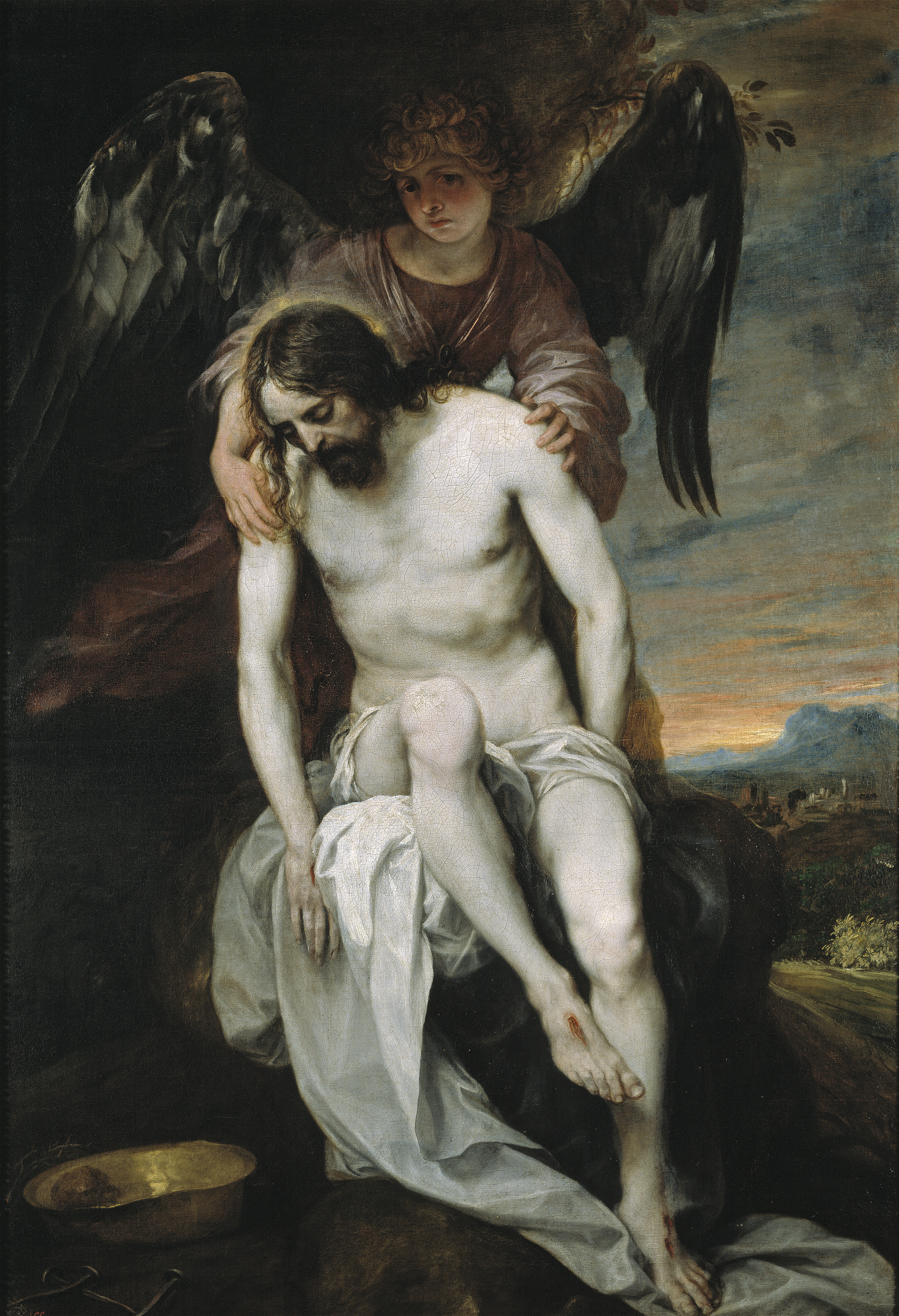 La obra representa a Jesucristo muerto y sostenido por un ángel.